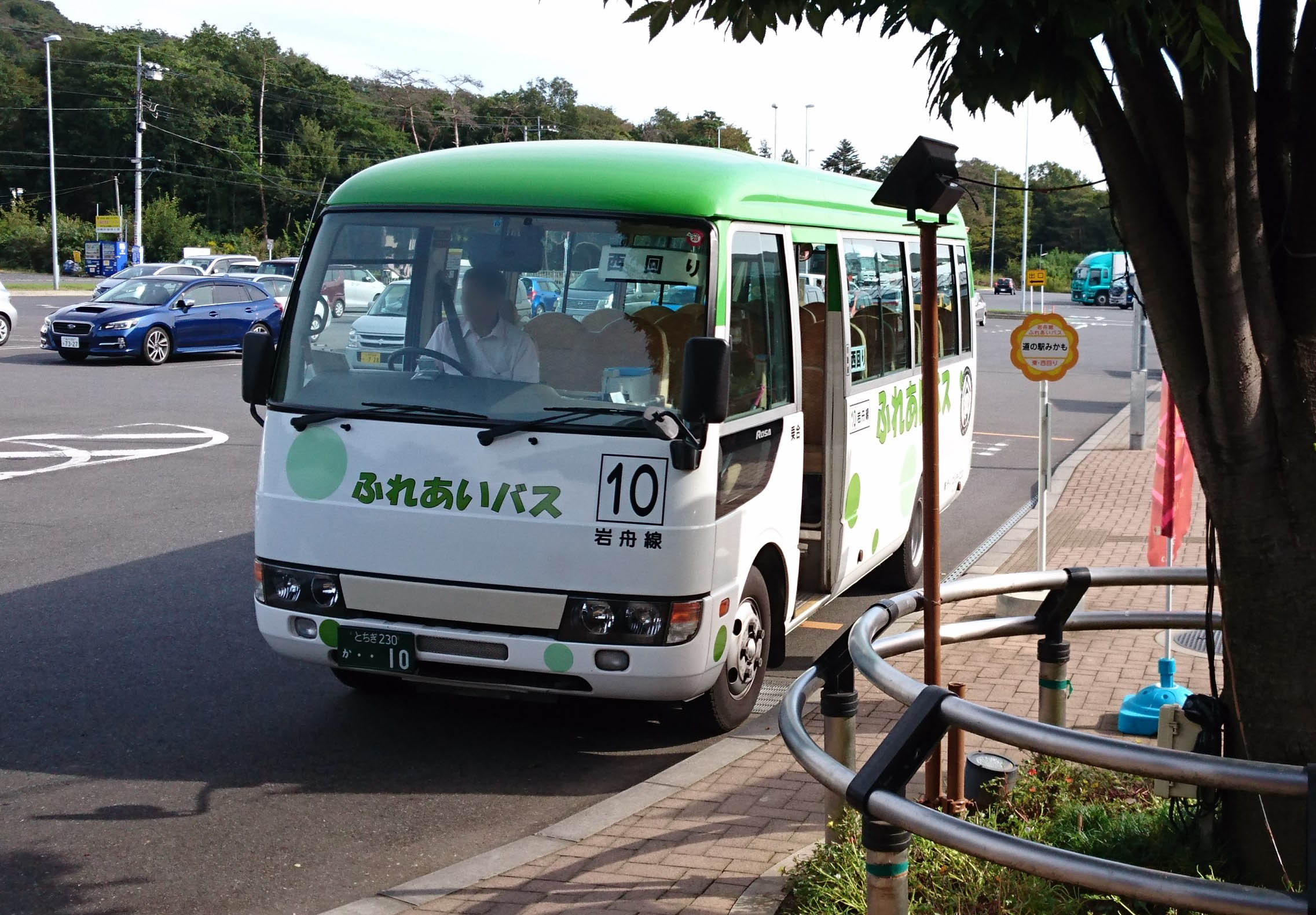 栃木市営バス岩舟線の車両（道の駅みかもで撮影）